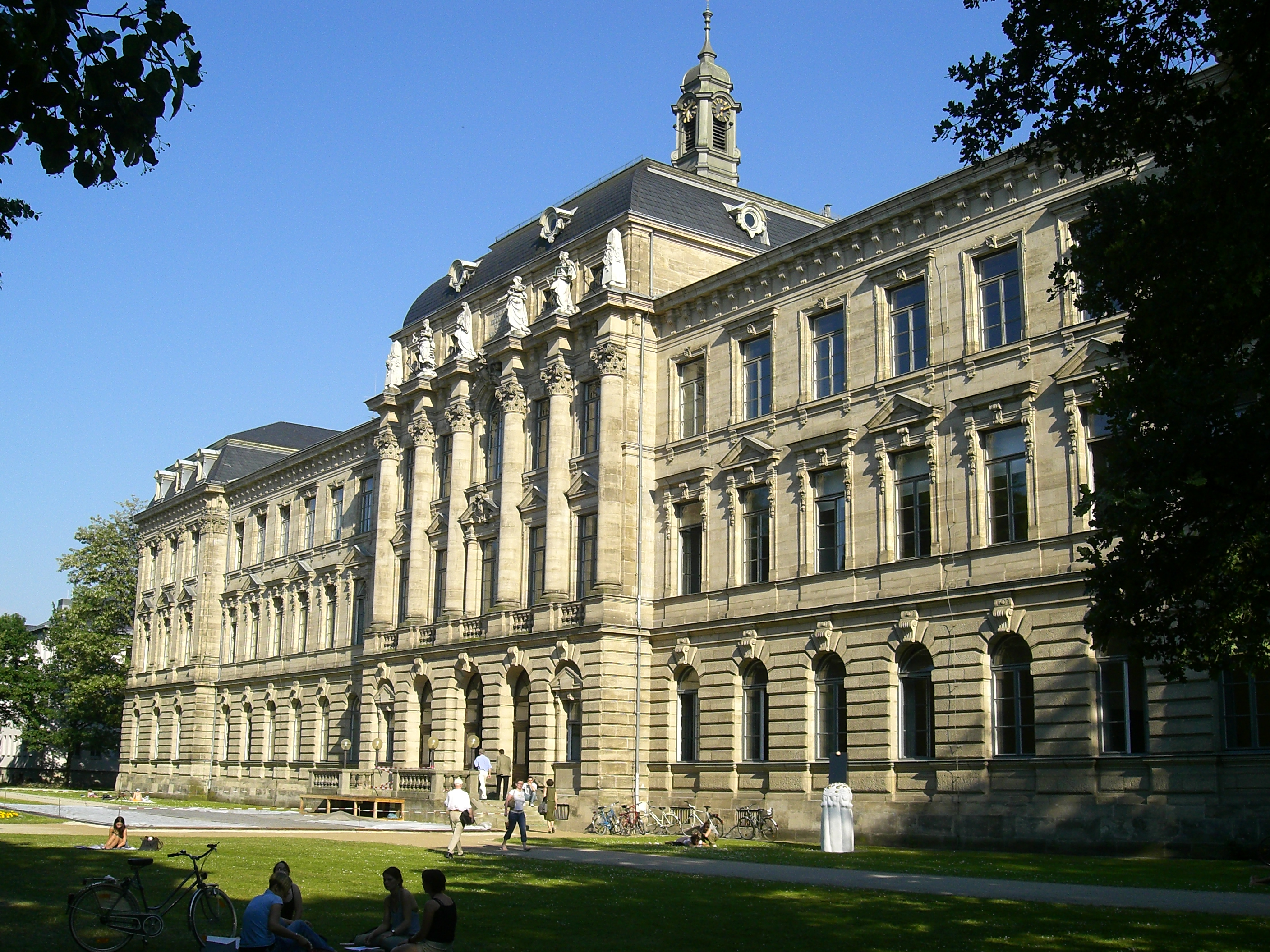 Picture taken from the "Kollegienhaus", one of the oldest buildings of the en: Friedrich-Alexander-University, Erlangen-Nuremberg Foto von der Rückfront des "Kollegienhauses", eines der ältesten Gebäude der de: Friedrich-Alexander-Universität Erlangen-Nürnberg, das heißt aus Sicht des erlanger Schlossgartens.